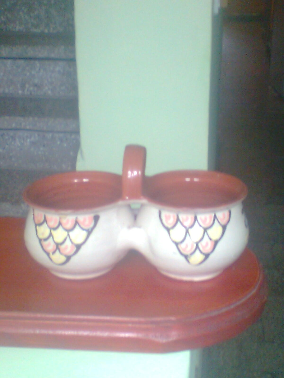 Pojemniki